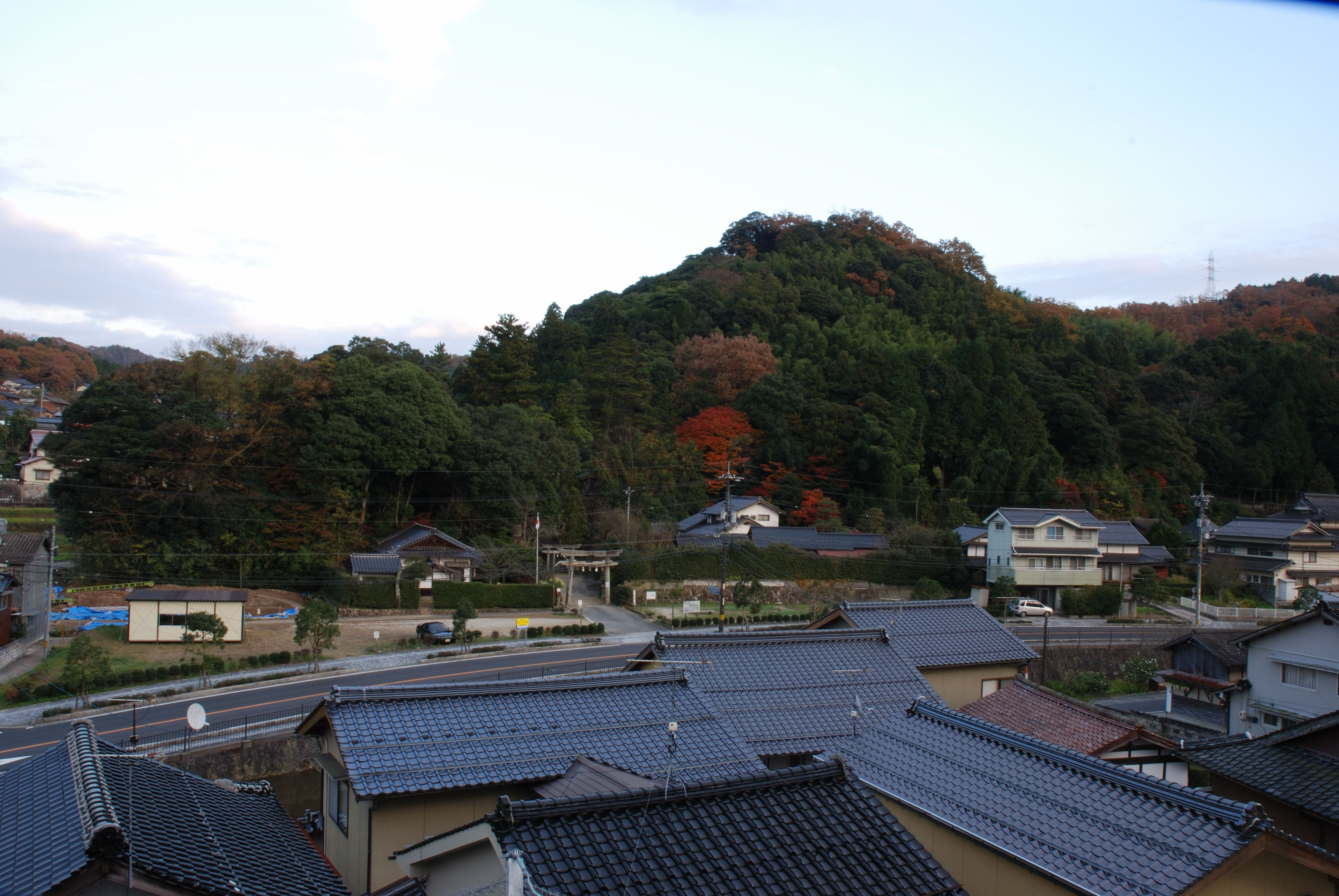 Tamatsukriyogaisan Castle